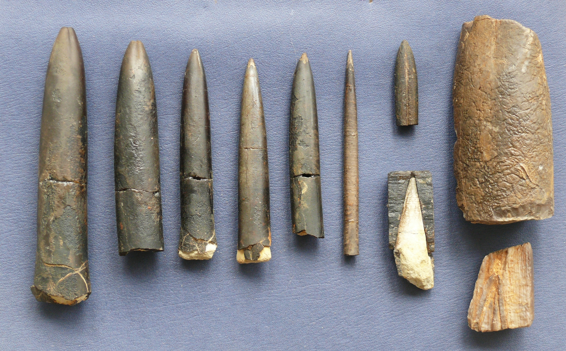 Belemnitenrostren aus dem Unteren und Mittleren Jura des östlichen Albvorlandes Anordnung der Exemplare im Bild: 7 9 1 2 3 4 5 6 8 10 1 – 5 : Weitgehend vollständige Rostren, Unterer Jura, ca. Grenze des Pliensbachium zum Toarcium (? Acrocoelites, ? Passalotheutis), 6 : Bruchstück eines langen Rostrums, Unterer Jura, unteres Toarcium, Basis des Posidonienschiefers (? Youngibelus) 7 : Bruchstück, Mittlerer Jura, Unteres Bajocium (? Belemnopsis) 8 : Aufgebrochenes, anatomisch vorderes Ende eines Rostrums mit angeschnittener Alveole, Unterjura, oberes Pliensbachium/unteres Toarcium 9 – 10 : Stark angewitterte Bruchstücke eines großen Belemniten (? Megateuthis) aus dem Mitteljura, Bajocium